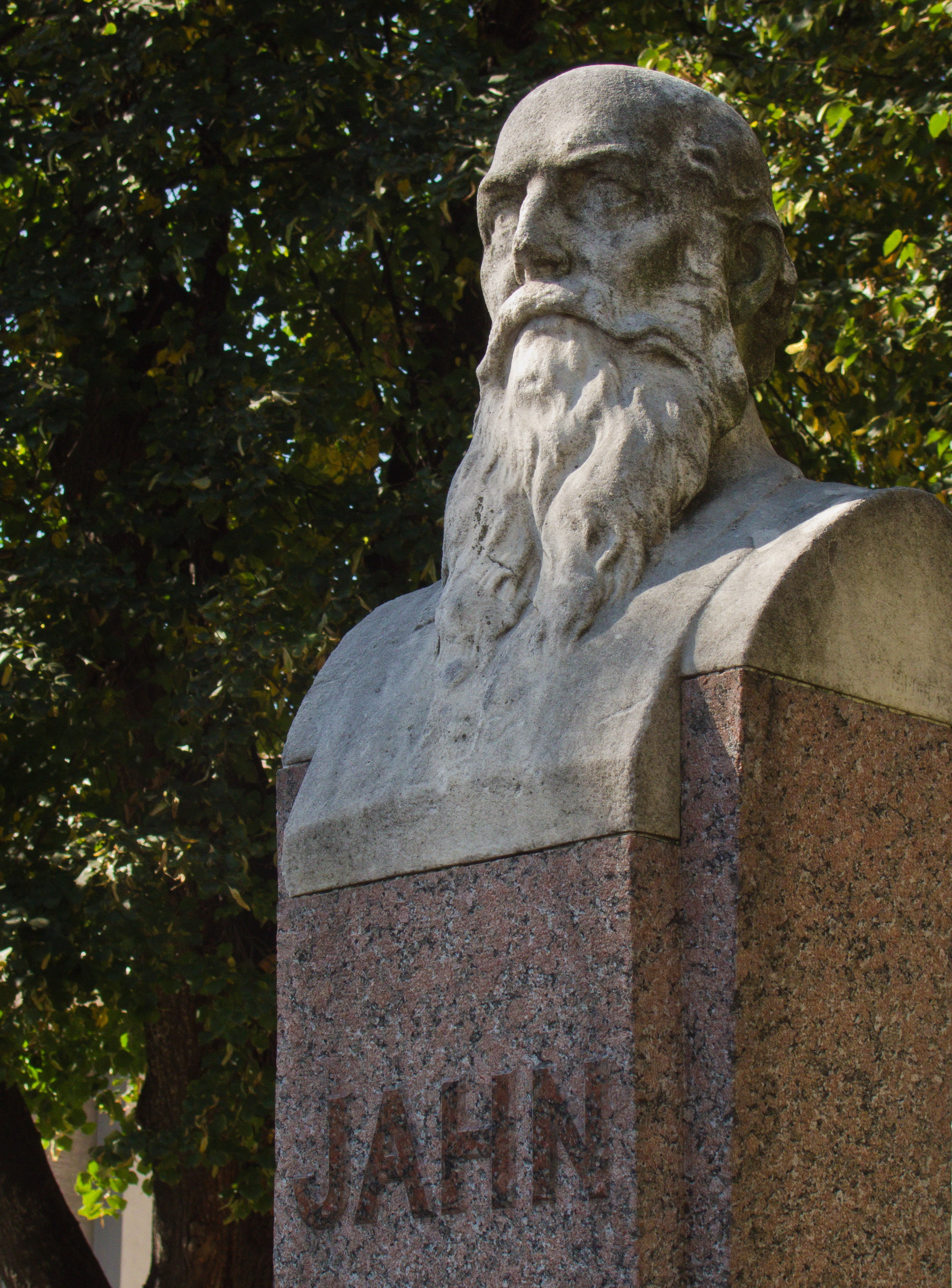 Jahndenkmal, Jahnplatz, 1906 Hermenpilaster mit Bronzebüste auf Steinpodest, 1906, vgl. Liste der Kulturdenkmäler in Worms-Kernstadt